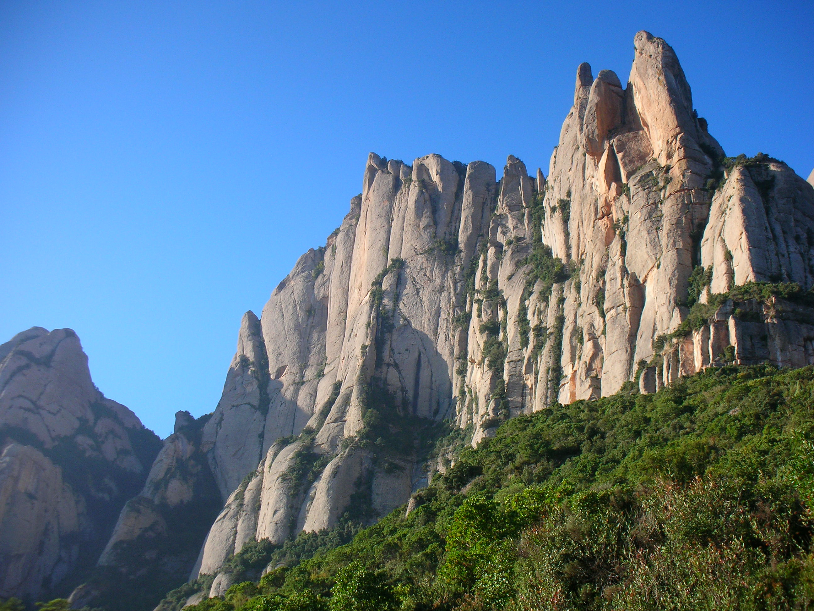 Serrat del Moro des de les immediacions del Refugi de Santa Cecília